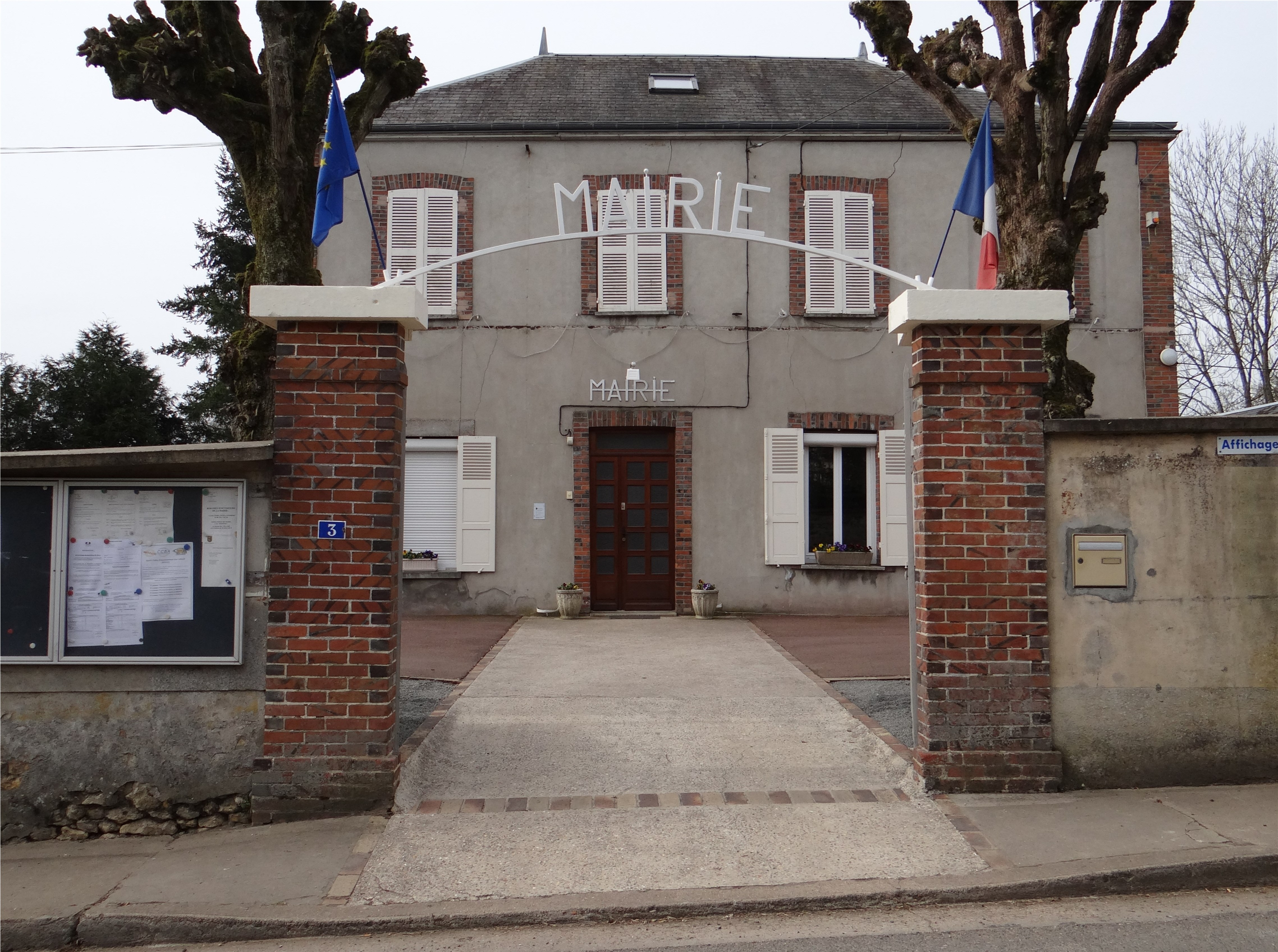 Mairie de Levainville, Eure-et-Loir, France.